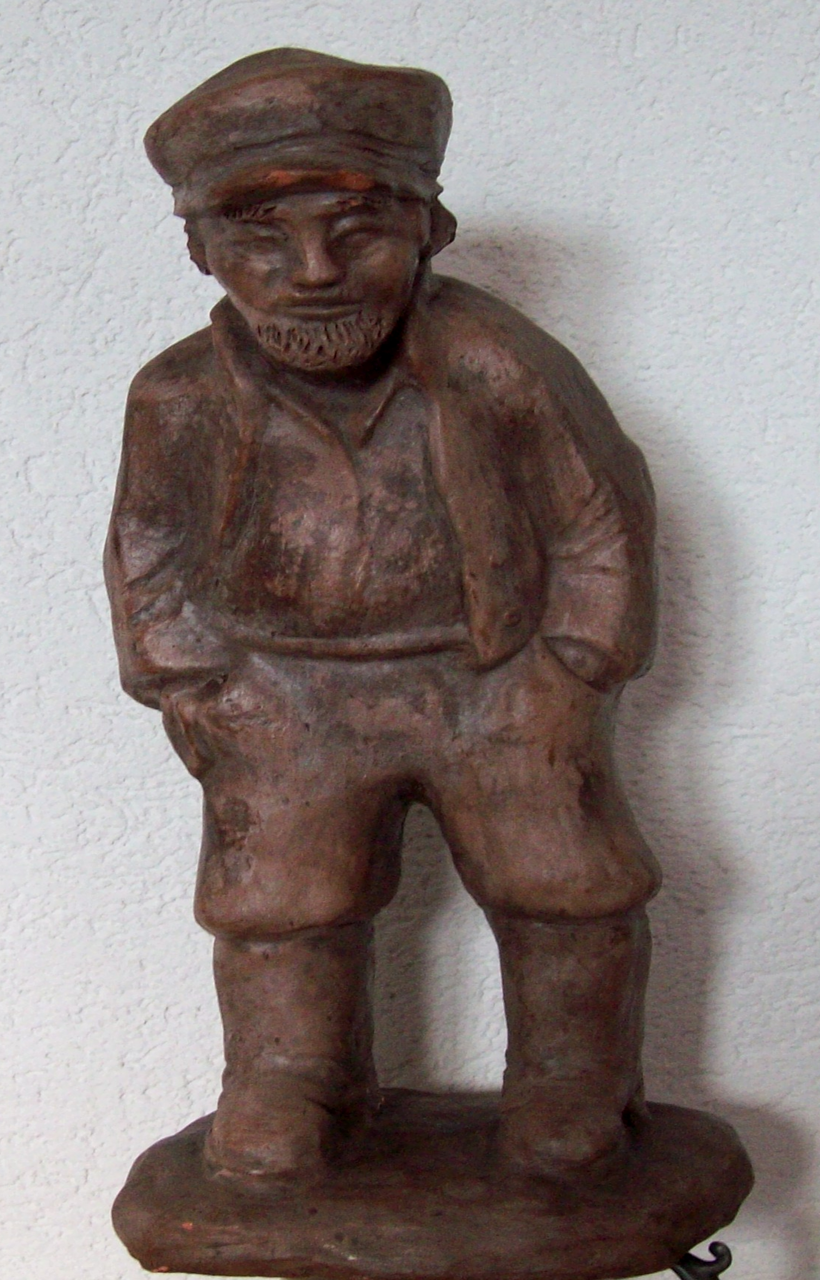 "Aschebercher Kumbeer" Tonplastik Sig. AR (Privatbesitz)